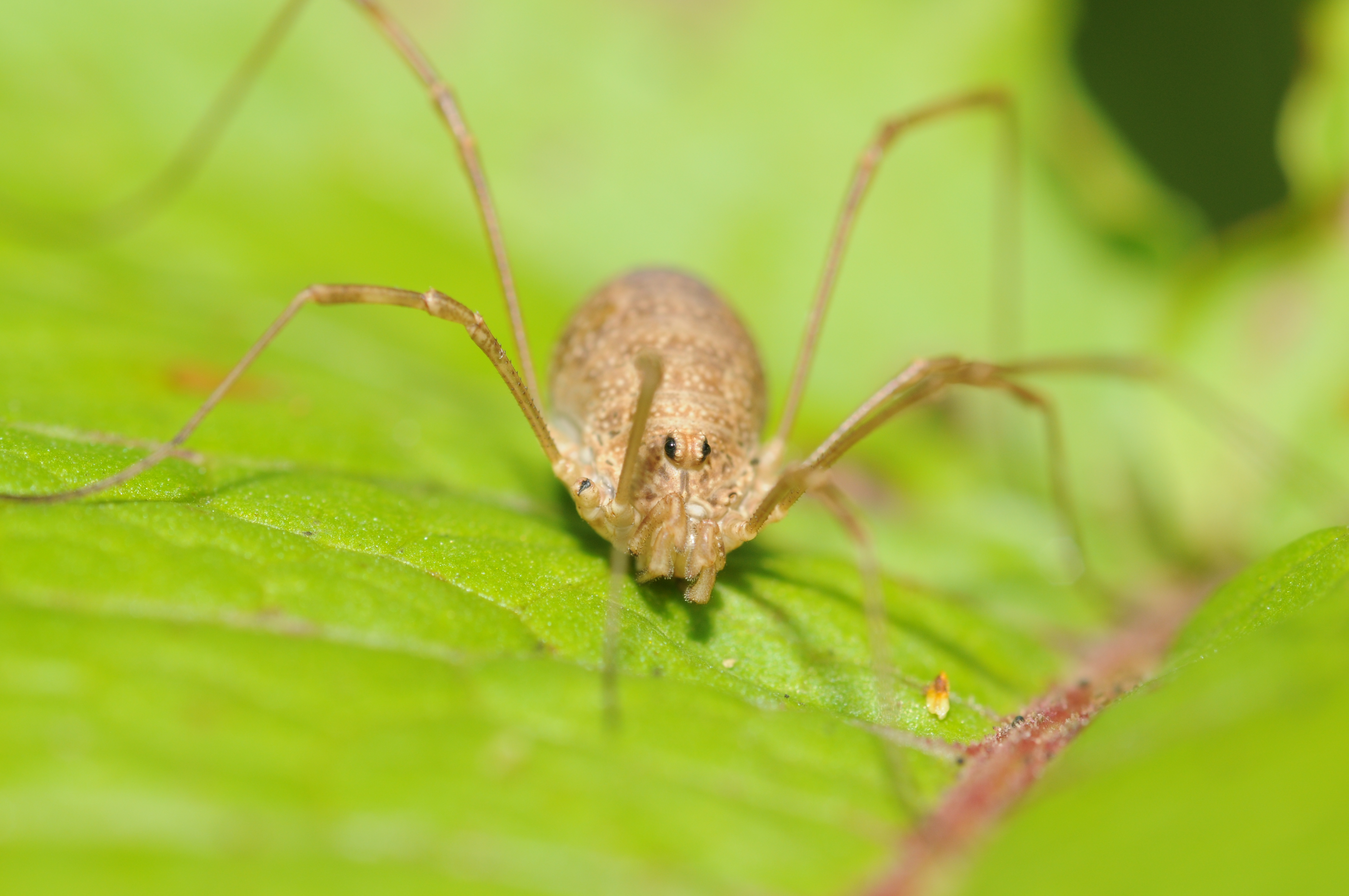 Opilion: Rilaena triangularis